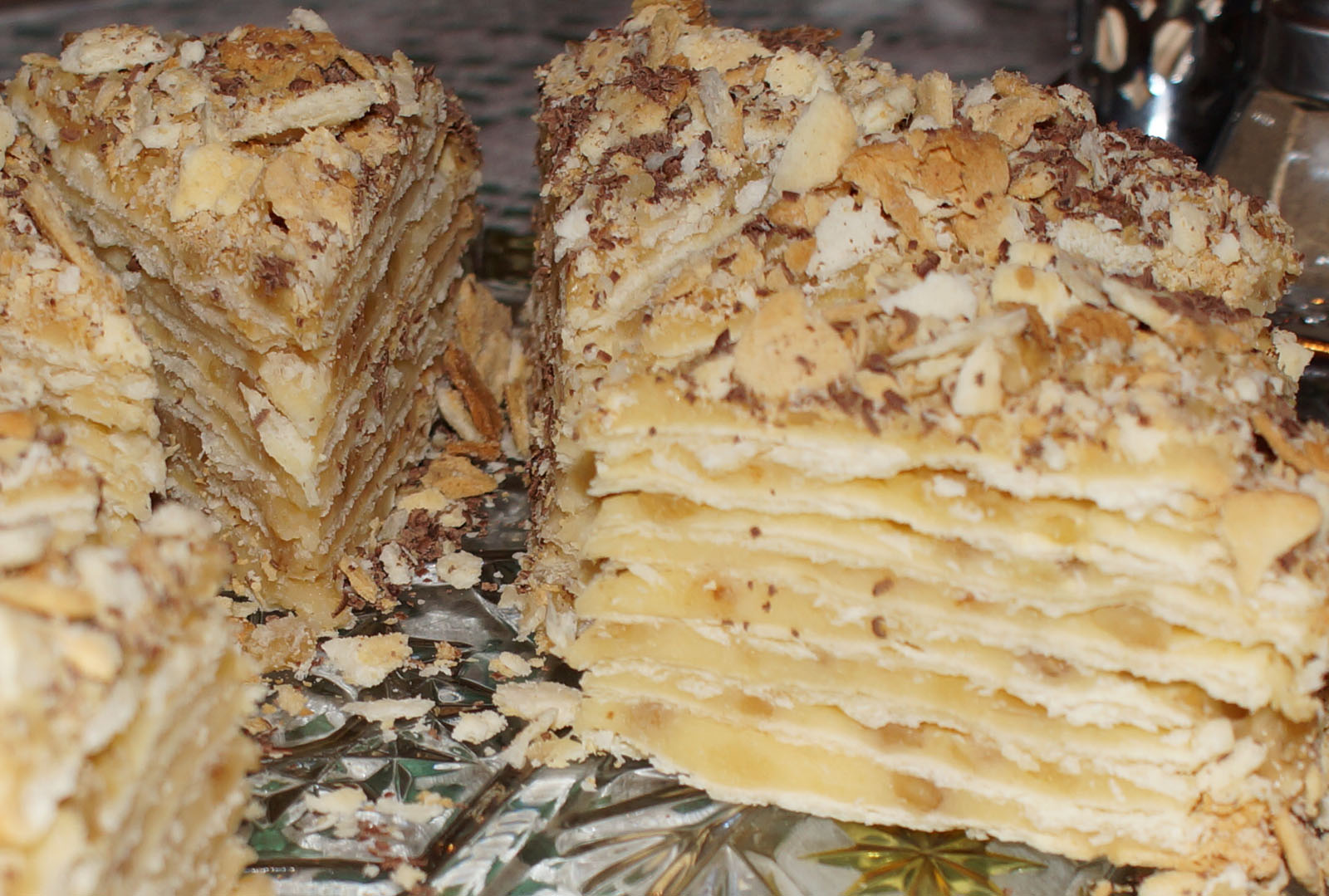 Stécker vum russesche Schichtkuch "Napoleon", mat hausgemate Flueden, Mousselinescrème an décken Nëss.